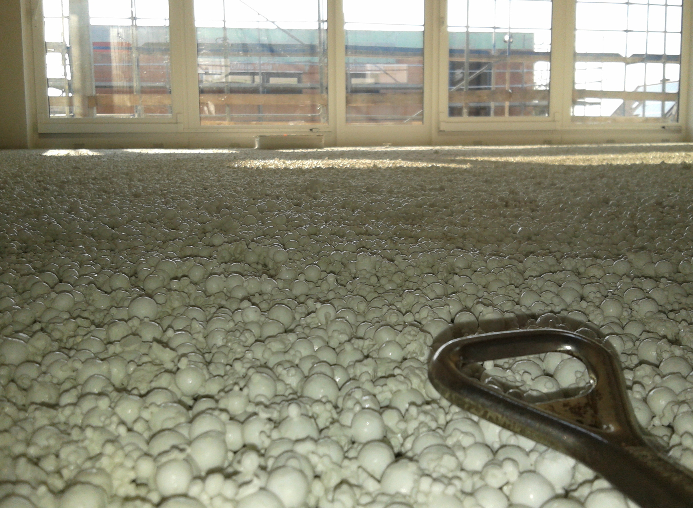 Leichtbeton mit Polystyrolkügelchen nach Einfüllung auf Rohbeton (Flaschenöffner dient als Referenzgröße)